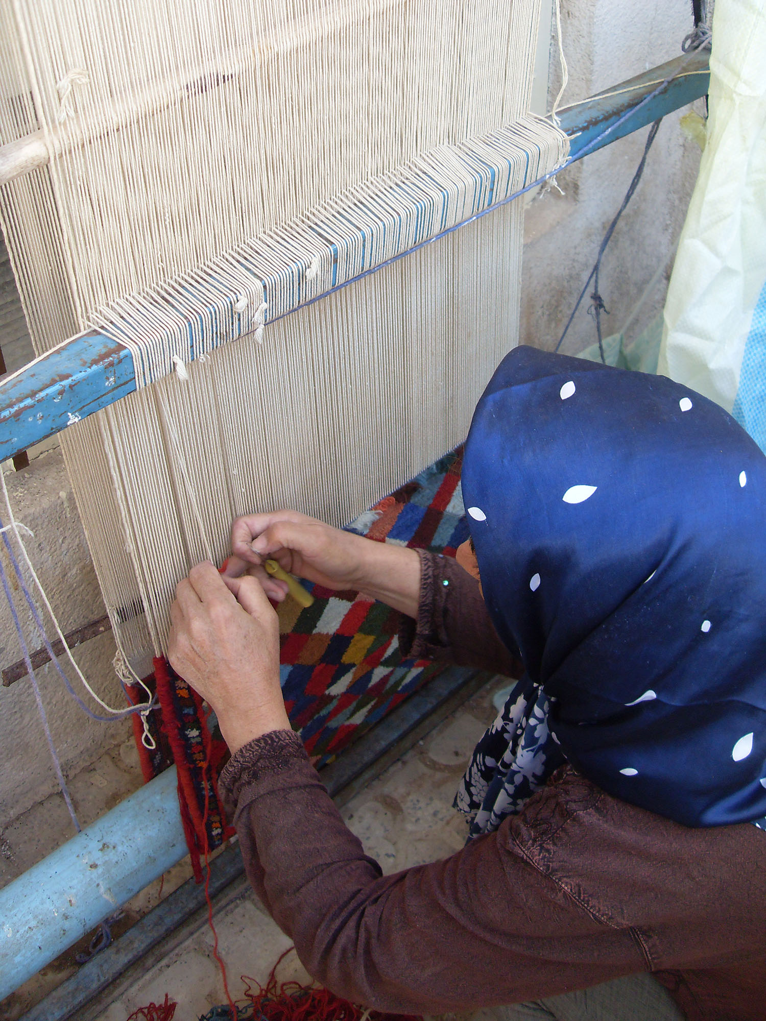 فرش ذهنی باف